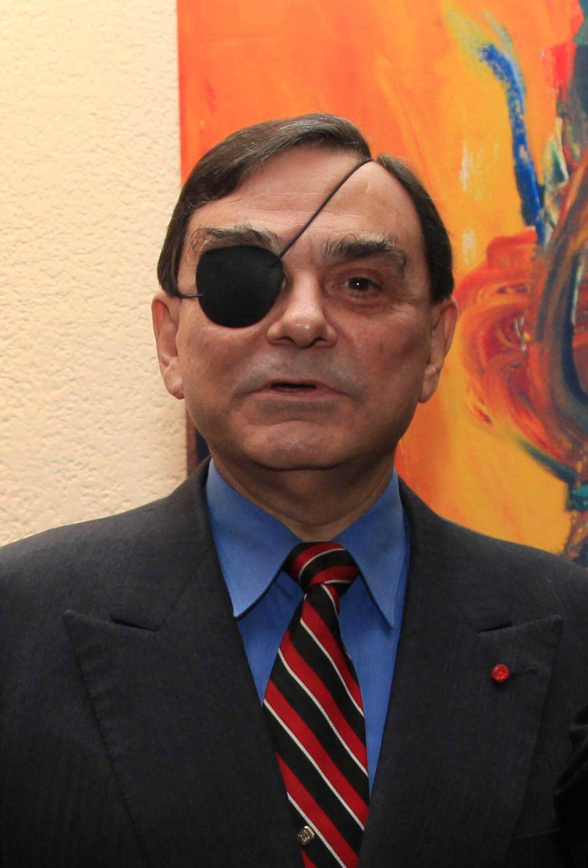 18 de octubre, Quito.- Junto al connotado periodista uruguayo-venezolano Walter Martínez, en la presentación de la tercera edición de la Revista de Política Exterior “Línea Sur 3”.